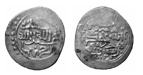 Abdullah Bin Abdullah döneminde basılmış para-Cezîre